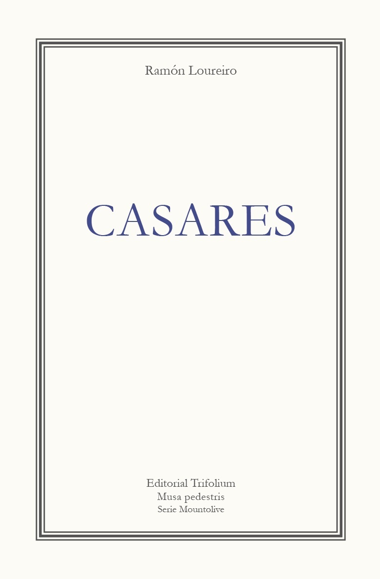 Loureiro, Ramón: Casares. Musa pedestris. Serie Mountolive. ISBN 9788494565441.